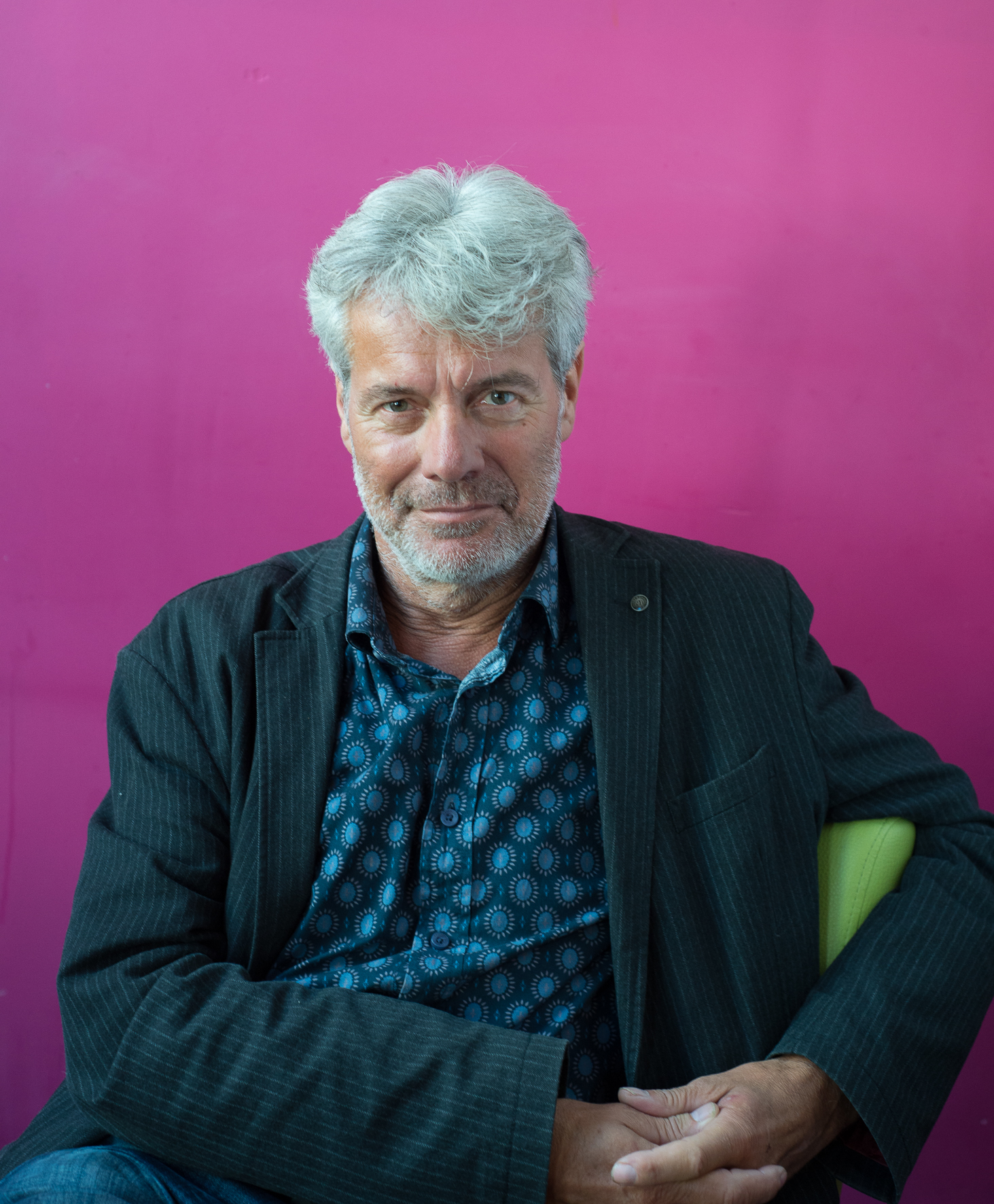 Eric Van Herreweghe